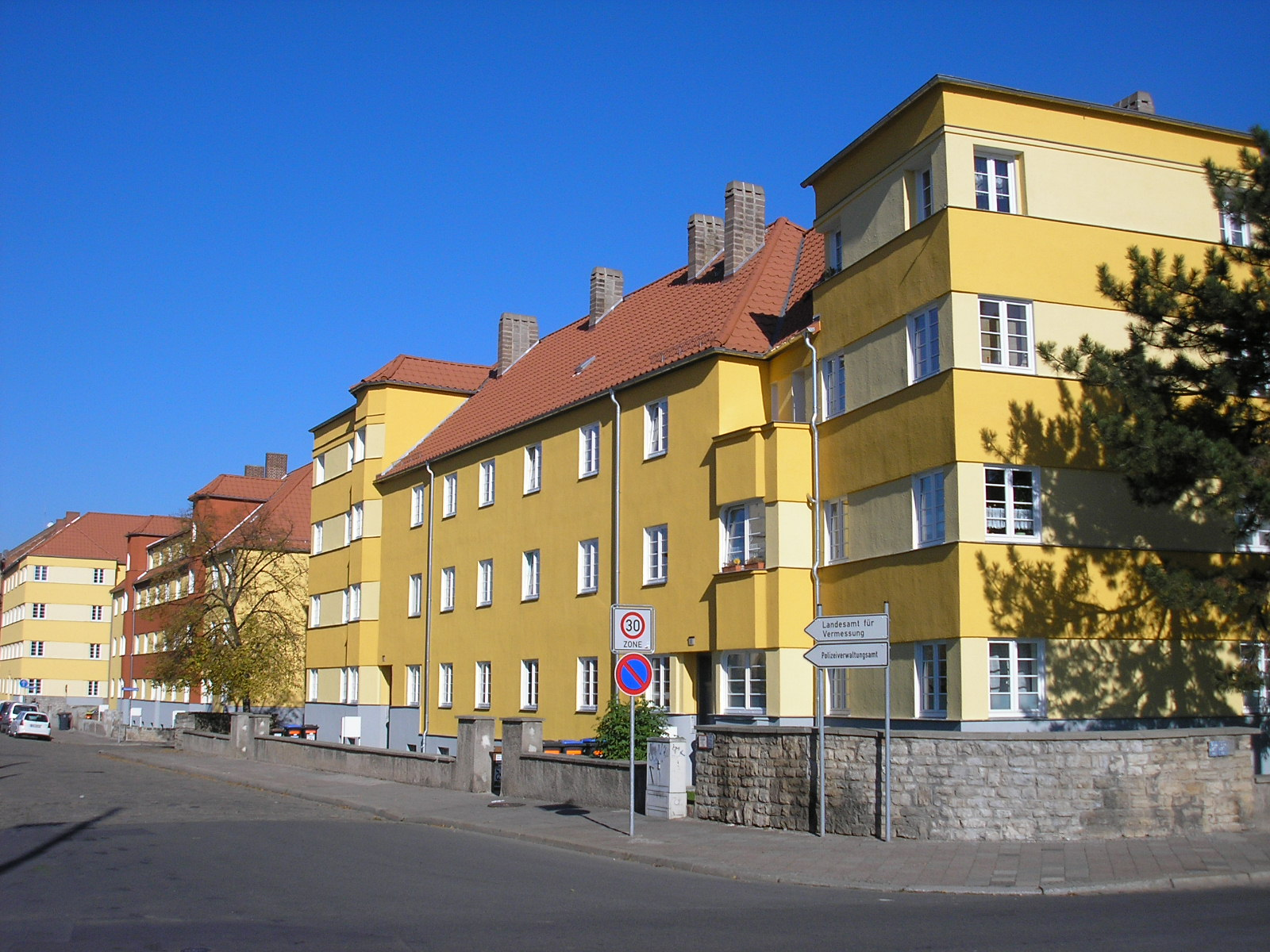 Die Bauhaus-Siedlung an der Hohenwindenstraße in Erfurt.